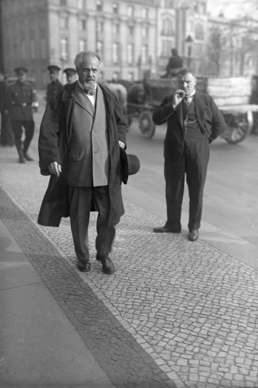 Die grosse Reichstage-Eröffnungsitzung am 13. Oktober in Berlin ! Der unabhängige Sozialist Crispien auf dem Wege zum Reichstag.